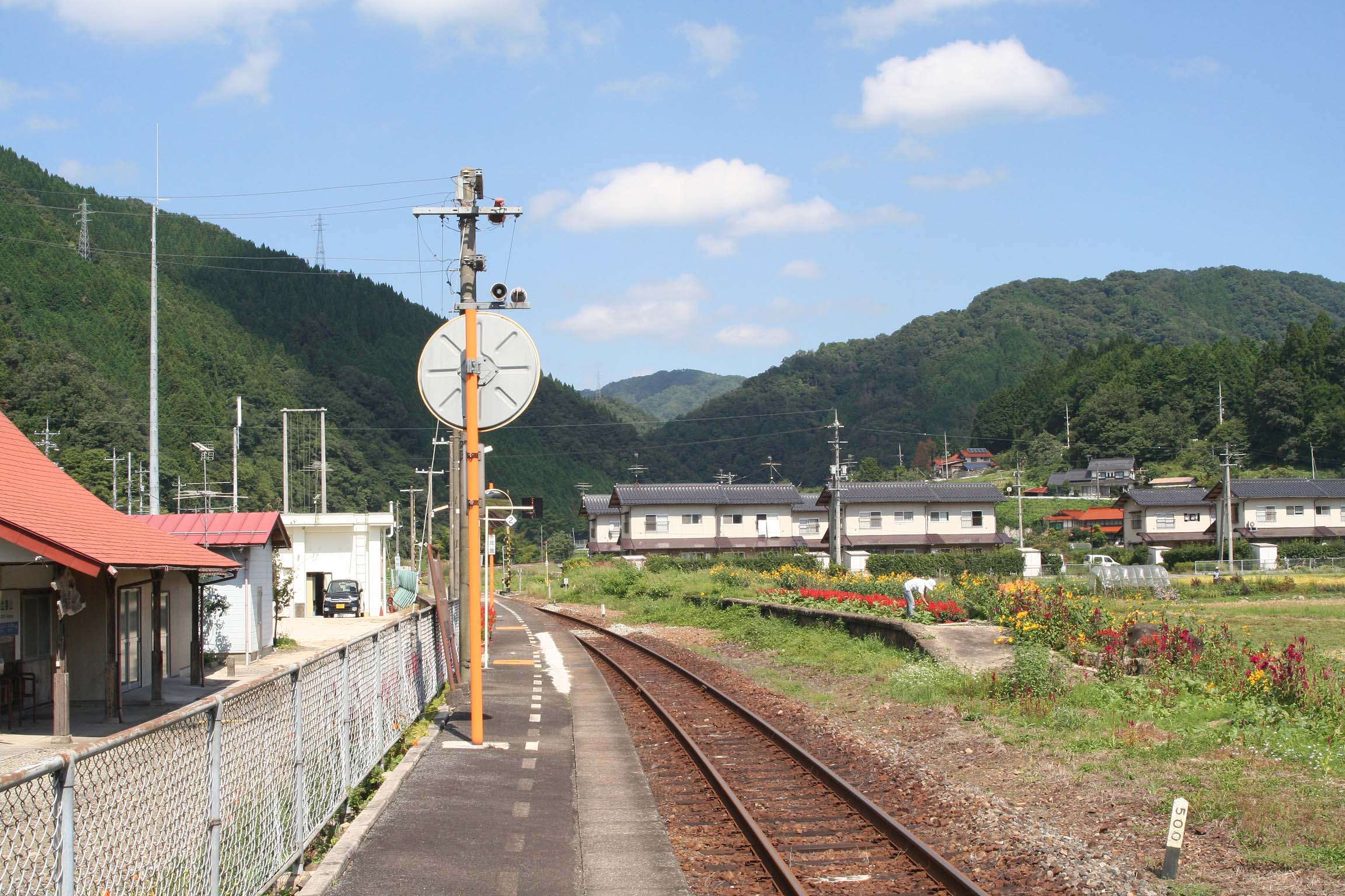 西日本旅客鉄道 比婆山駅の構内